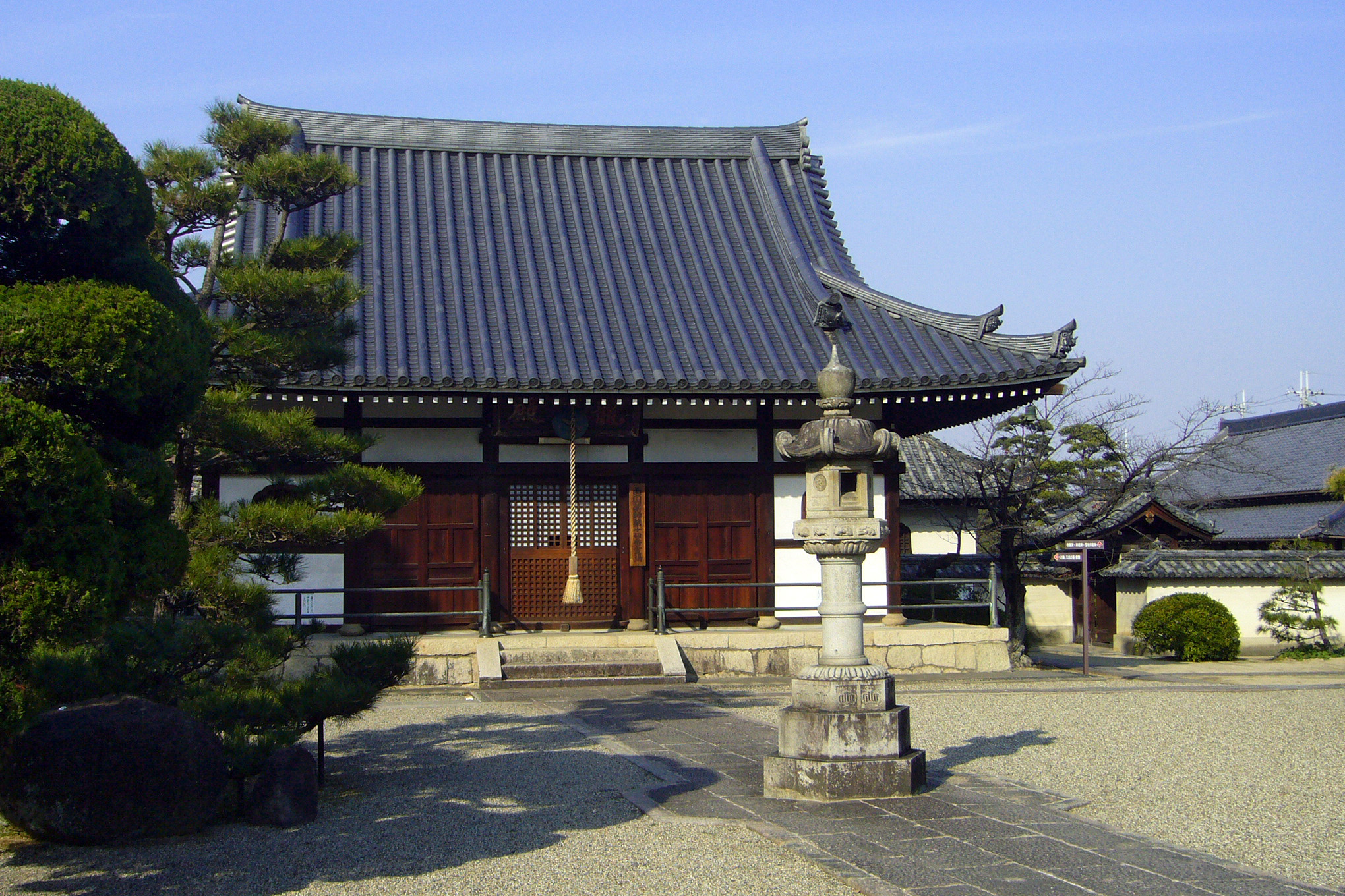 Yachuji in Habikino, Osaka, Japan